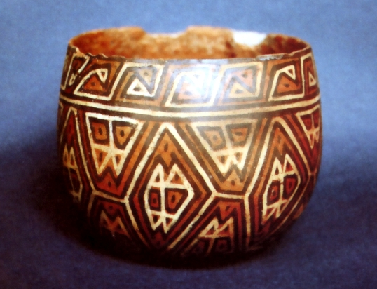 Taza de estilo Playa Grande, con decoración "interlocking". Cultura LIMA (aprox. siglo II - V d.C.)